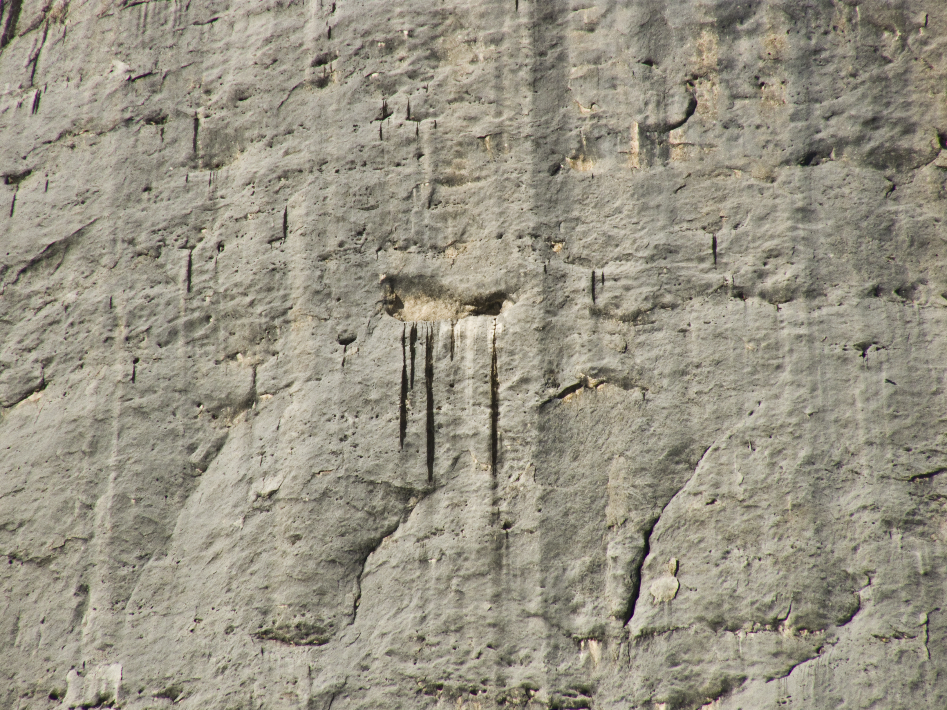 la cengia del pesce: cengia della omonima via "attraverso il pesce" aperta da Koller,Sustr dal 2 al 4/8/1981 - disl.920mt -svil. 1220mt (38 tiri) diff. 7b/r4/V ED+ - tempo 12/14 hr